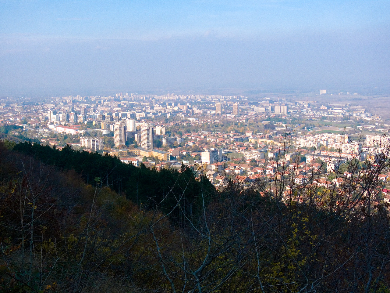 View to Vratsa, Bulgaria